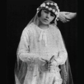 Eva Duarte (Evita). 1ra comunión